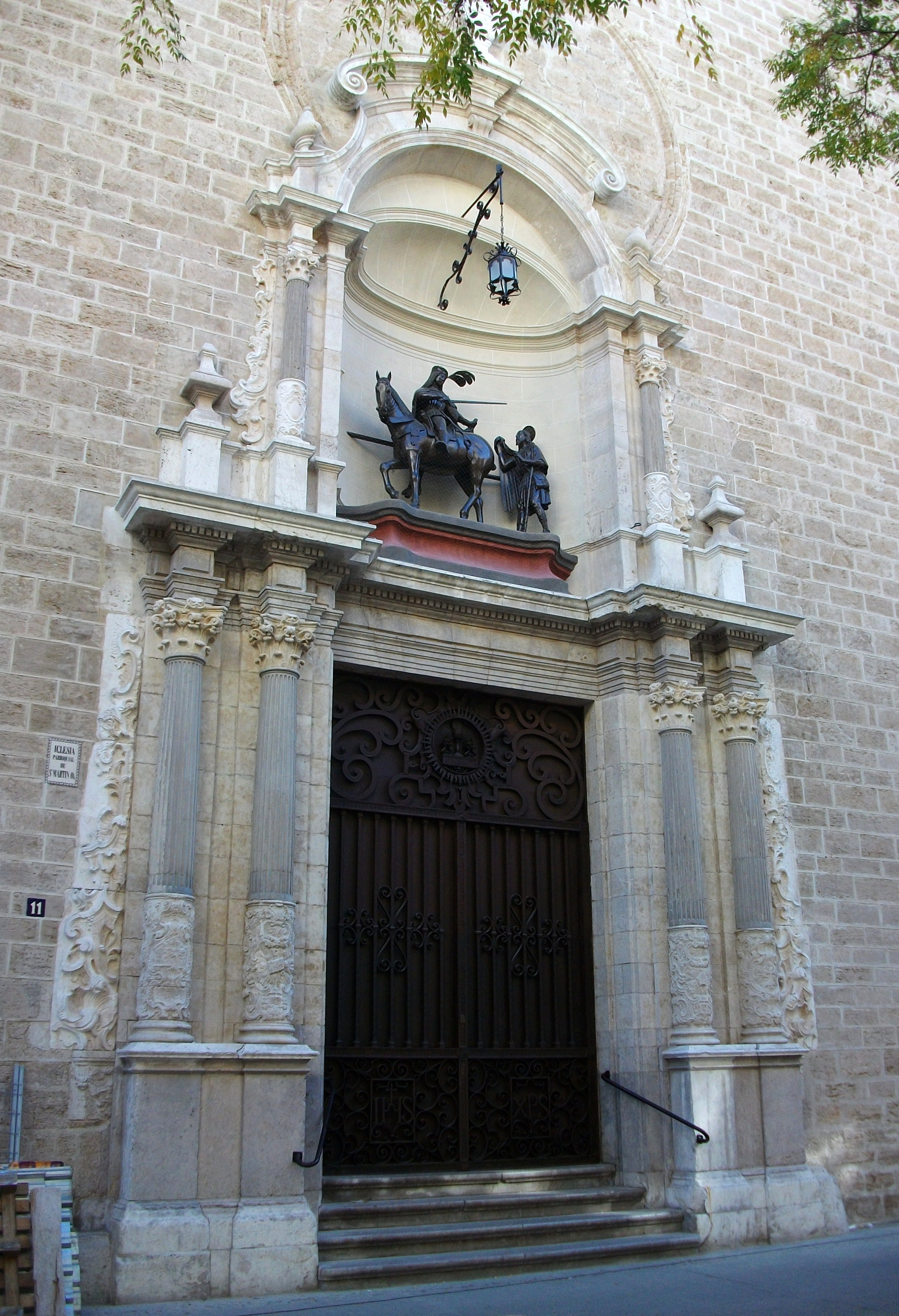 Portalada de l'església de sant Martí, València.